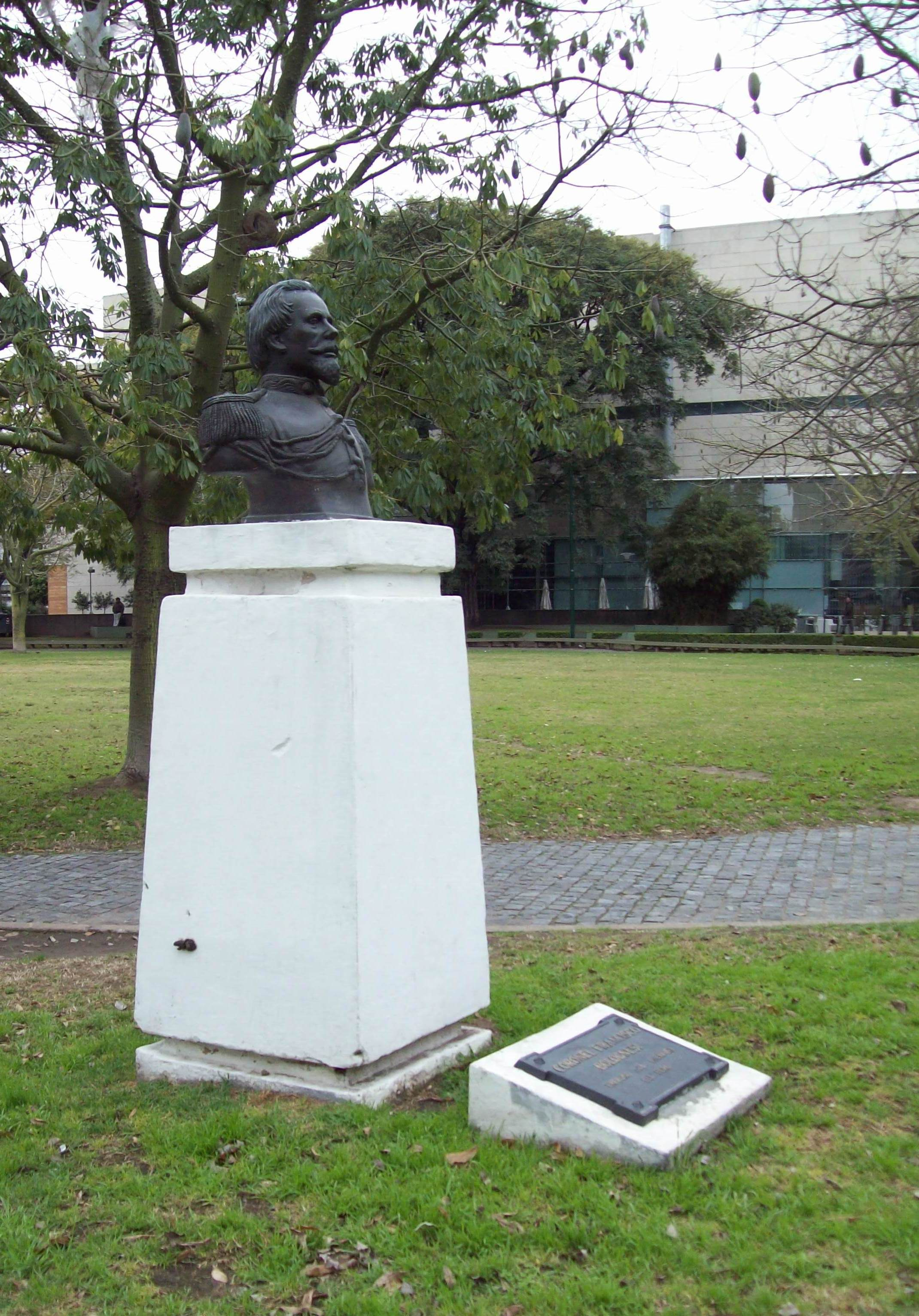 Monumento al Coronel Francisco Bolognesi en la Plaza República del Perú.